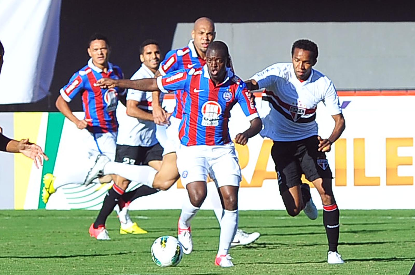 2012-09-02_Campeonato Brasileiro 2012_Série A_Bahia 1 x 0 São Paulo_Estádio Roberto Santos_PItuaçu